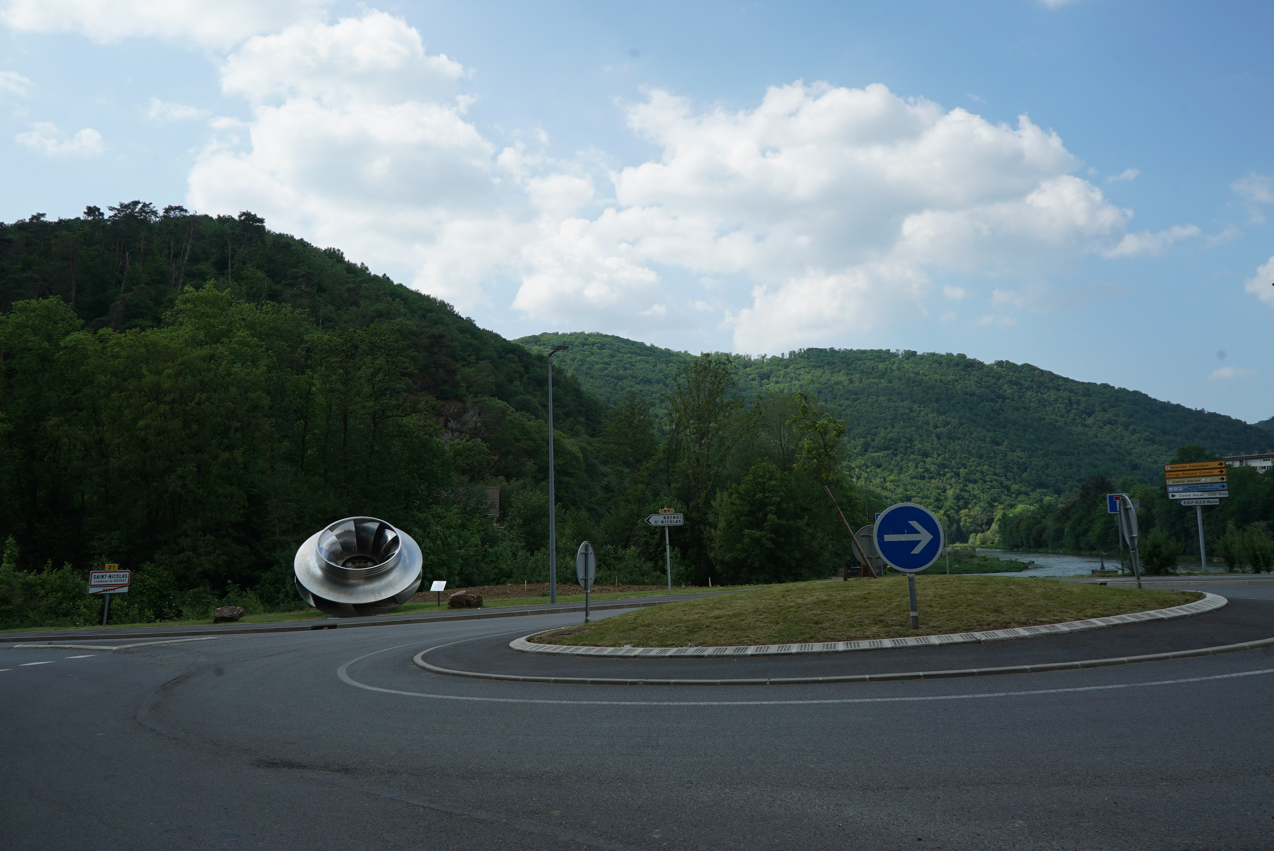 photographie de Revin vers st-Nicolas, turbine de l'usine hydrolélectrique du barrages des Marquises.